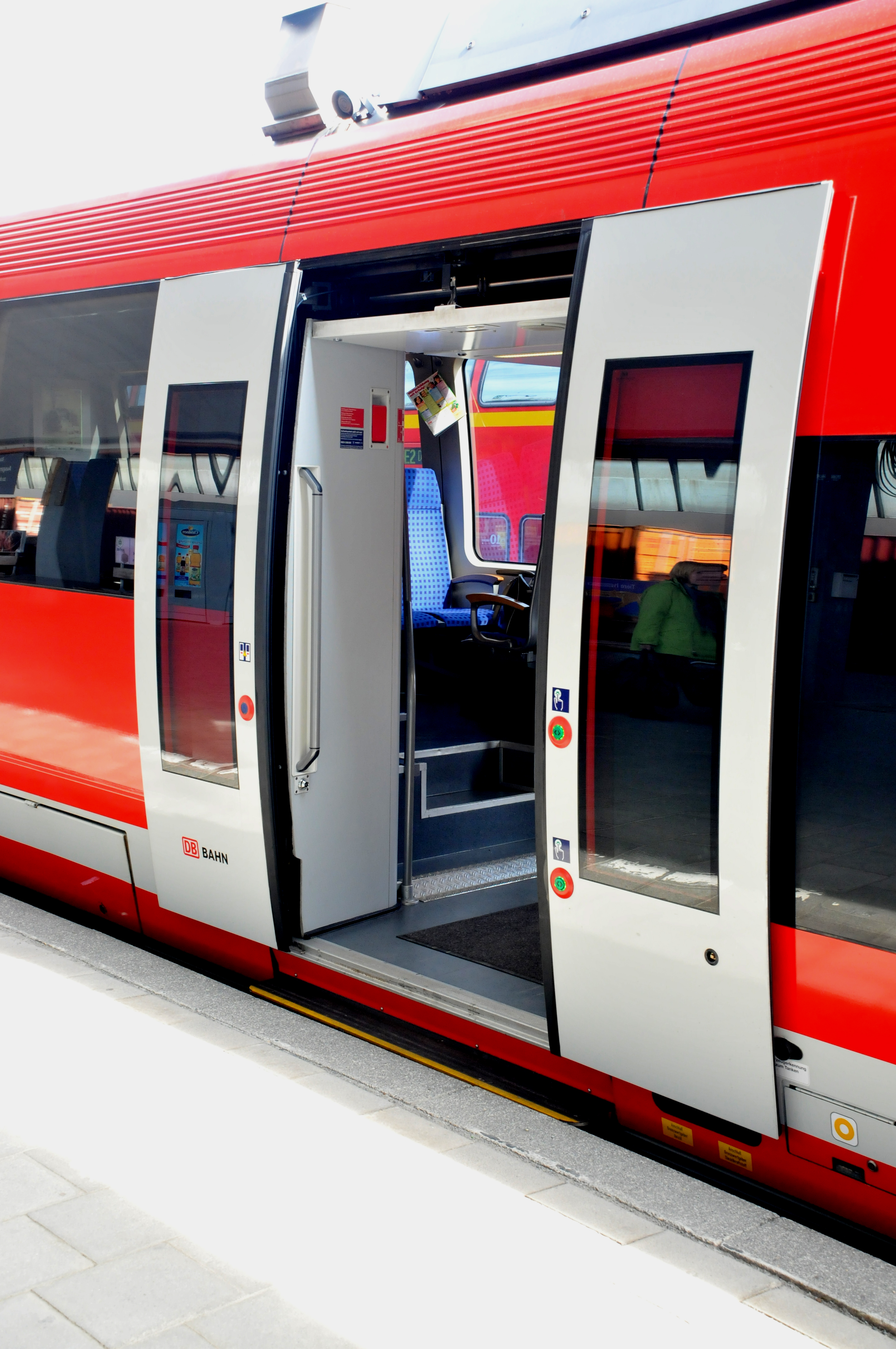 DB treinstel serie 643. In 2011 werden 34 treinstellen voor de nieuw opgerichte DB Regio Westfalen volledig gerenoveerd. Hierbij werd de hoogte van alle balkons op dezelfde hoogte van hoogte perrons gebracht. Hierbij werd ook een vaste trede aan de buitenzijde van de trein aangebracht. Deze treinen worden op drie westelijke trajecten in Münsterland ingezet. * Enschede - Münster * Enschede - Dordnund * Münster - Coesfeld